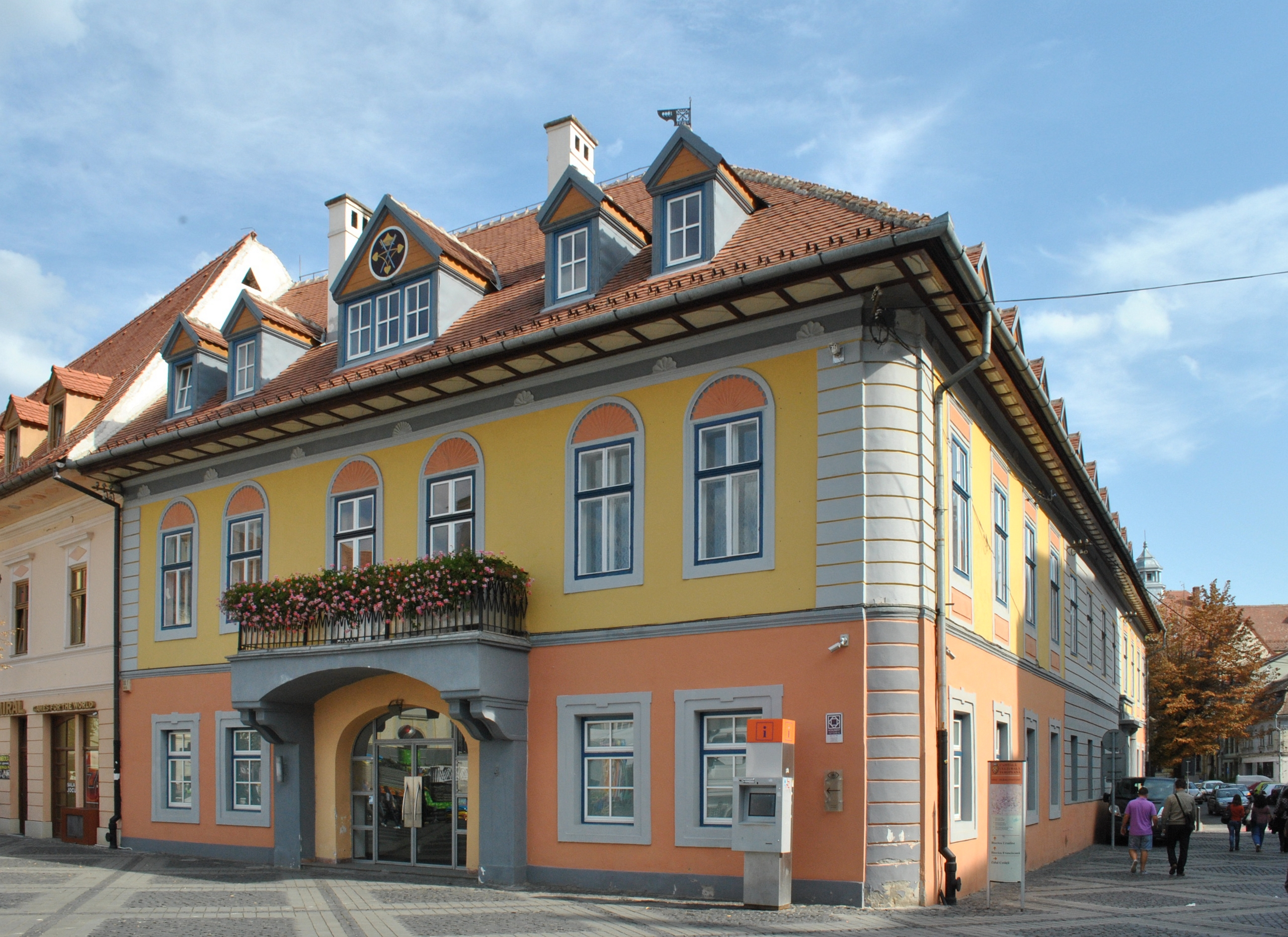 Casa Lutsch, azi Banca București-Frankfurt și sediul F.D.G.R. sec. XV, transf. 1830